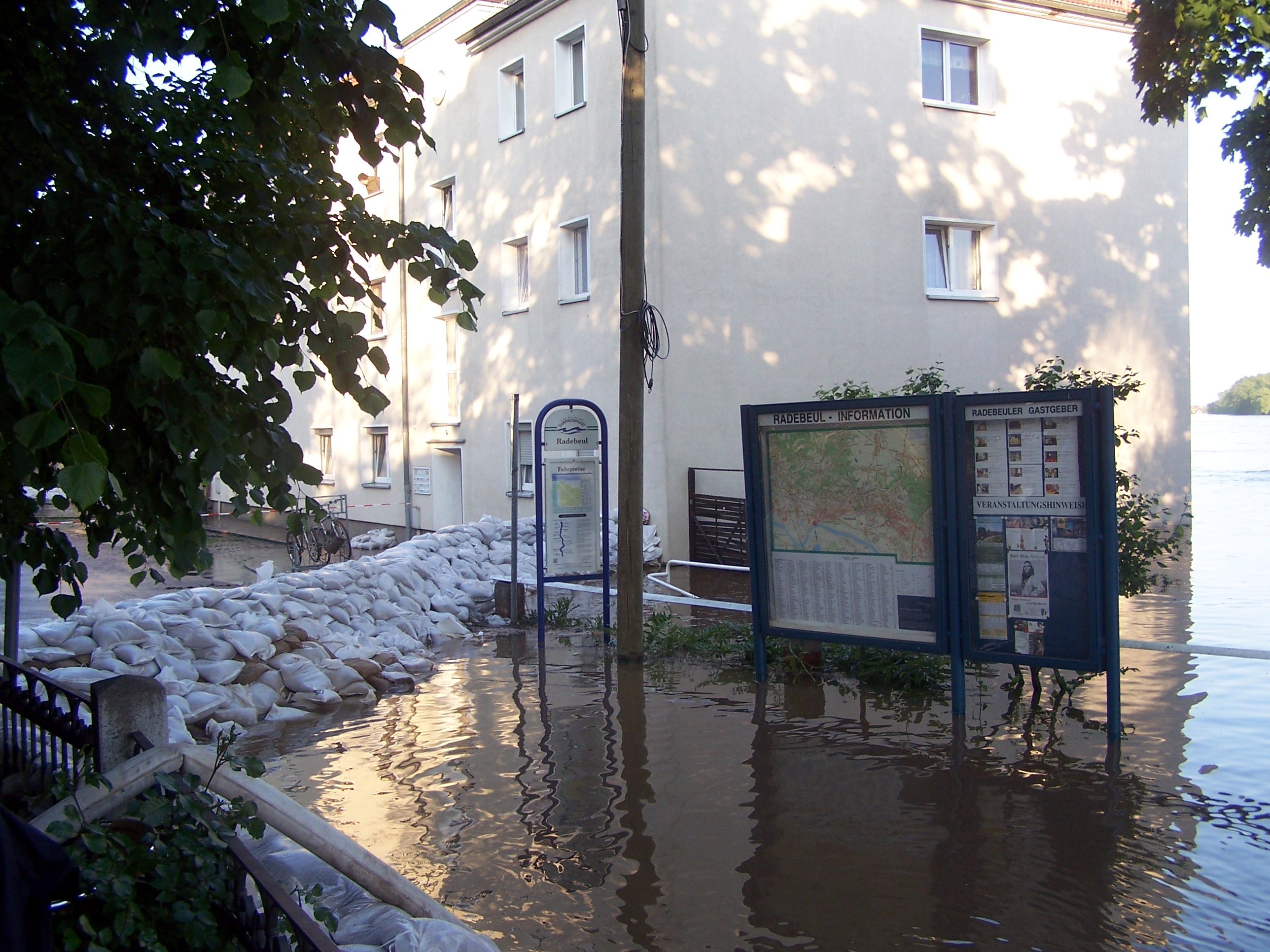 Hochwasser Juni 2013 in Radebeul, Sandsackdamm Uferstraße/Elberadweg/Restaurant „Dampfschiff“